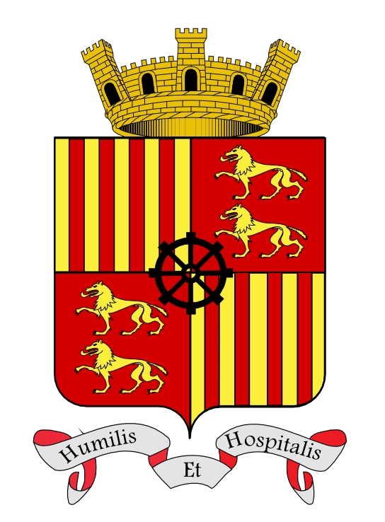 blason de la commune de boucagnères